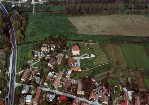 Szabadbattyán, Hungary, aerial photography